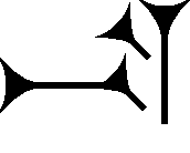 Cuneiform sign